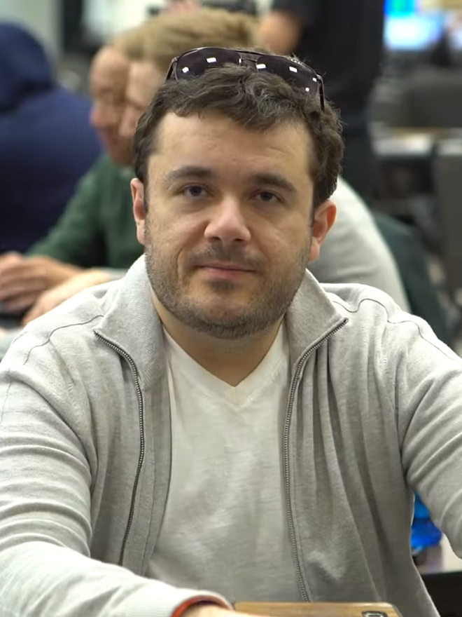 Anthony Zinno bei der WPT Season XVI LAPC